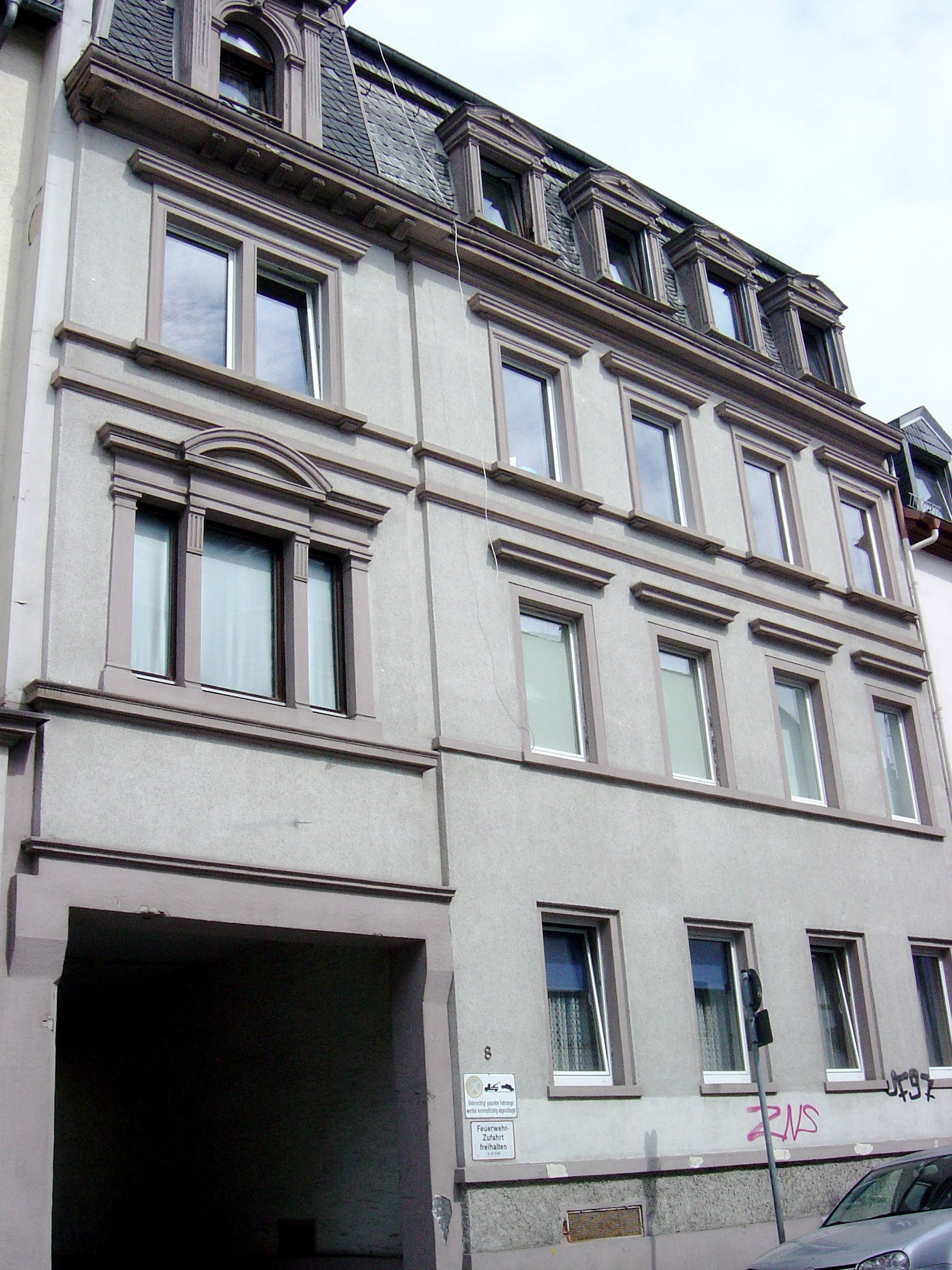 Frankfurt Bockenheim Landgrafenstraße 8, ehemals Geschäftssitz der Gebrüder Knodt Blech- und Metallwarenfabrik, Kunstgießerei. Nach dem Ersten Krieg Umwandlung in eine GmbH, dann in die Knodt Metallwaren Aktiengesellschaft. Aktienmehrheit Tellus AG. Die Knodt AG ging in der Wirtschaftskrise um 1930 in Konkurs. Haus wurde nach Kriegsschäden saniert. Hat immer noch Teile einer ausgearbeiteten Hausfassade.